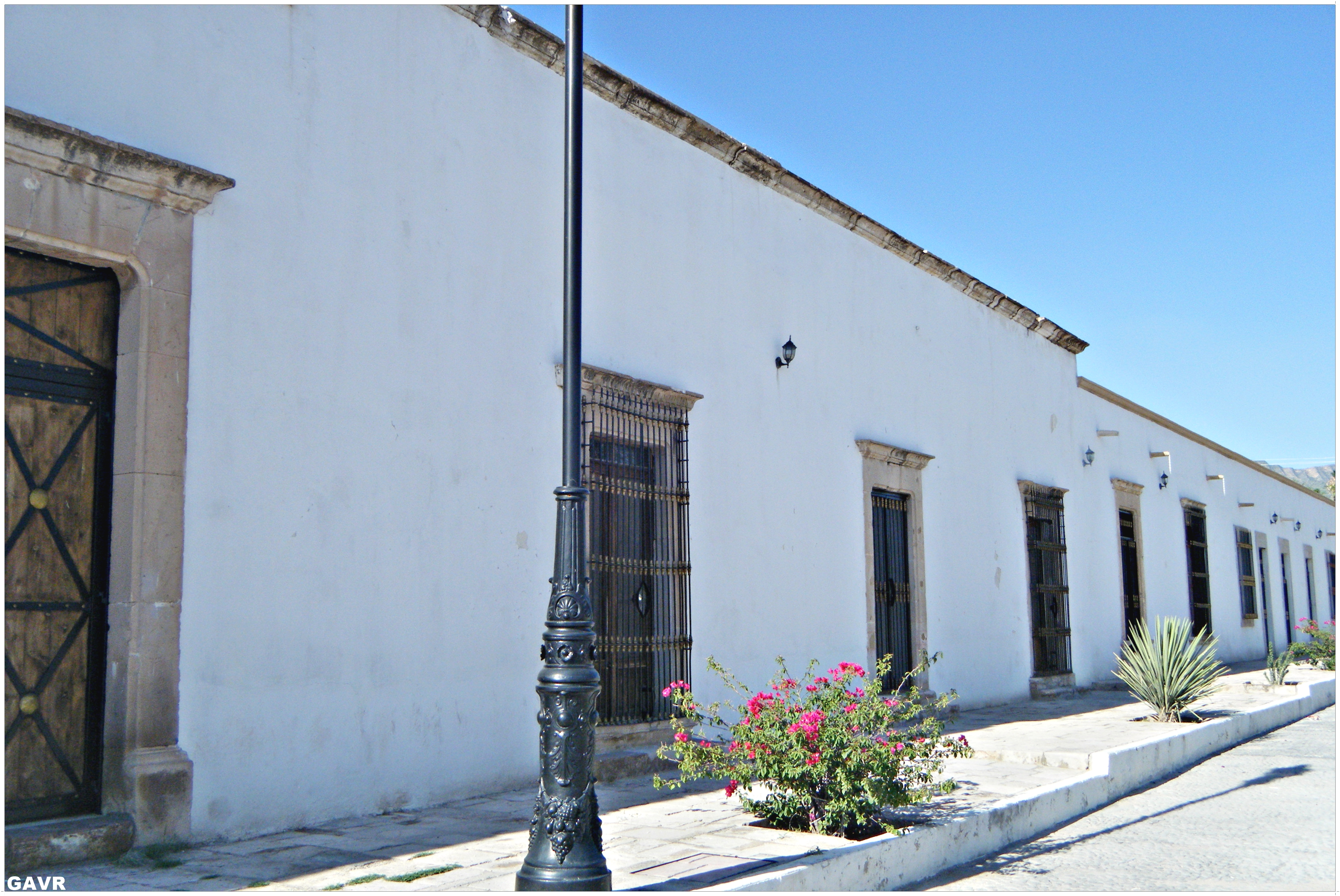 casa donde se hospedo juarez